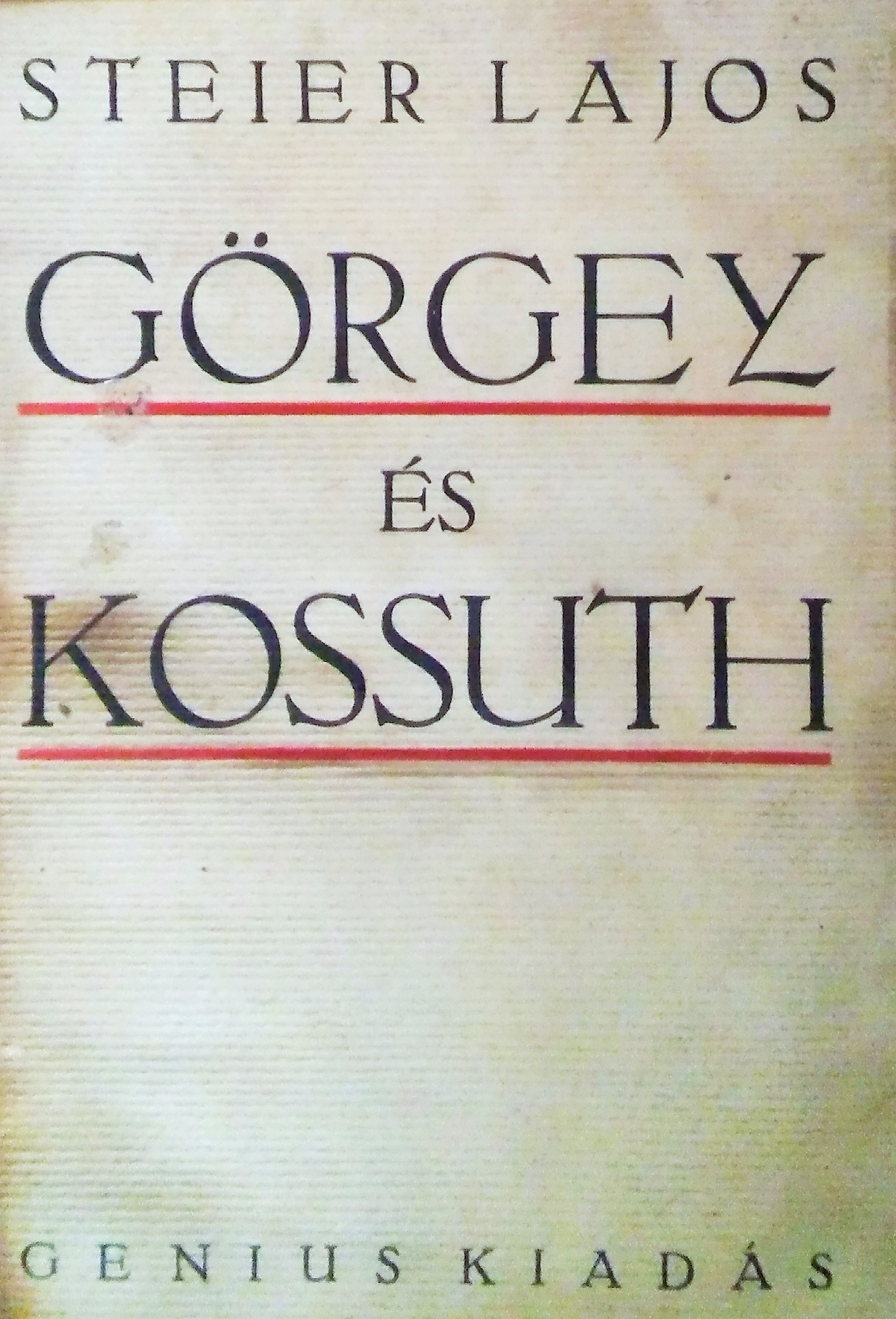 Steier Lajos (1885-1938): Görgey és Kossuth, 1930-as évek